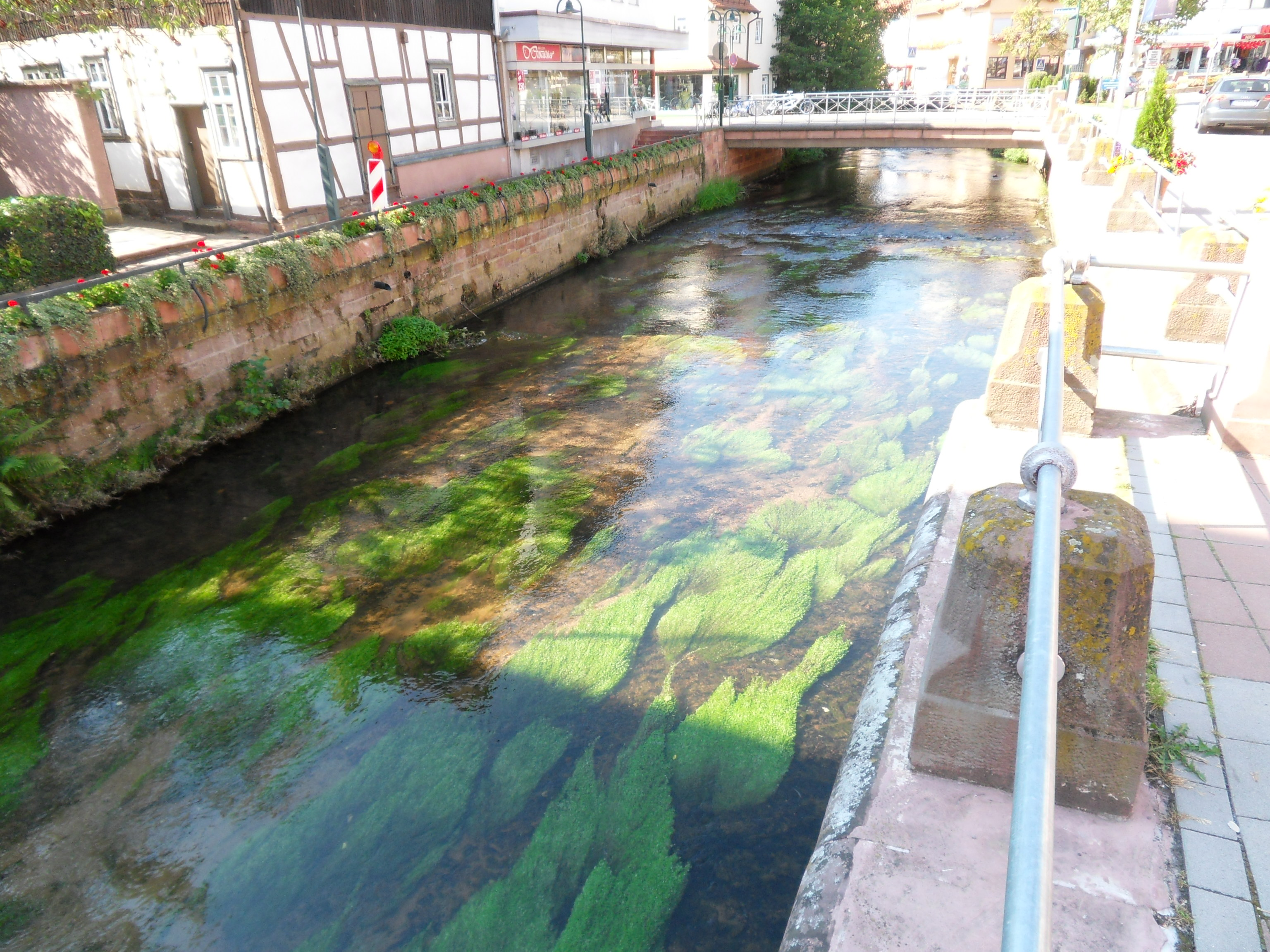 Mümling in Erbach (Odenwald), in der Strömung bewegen sich rankende Wasserpflanzen, vermutlich Wasserpest (Elodea)